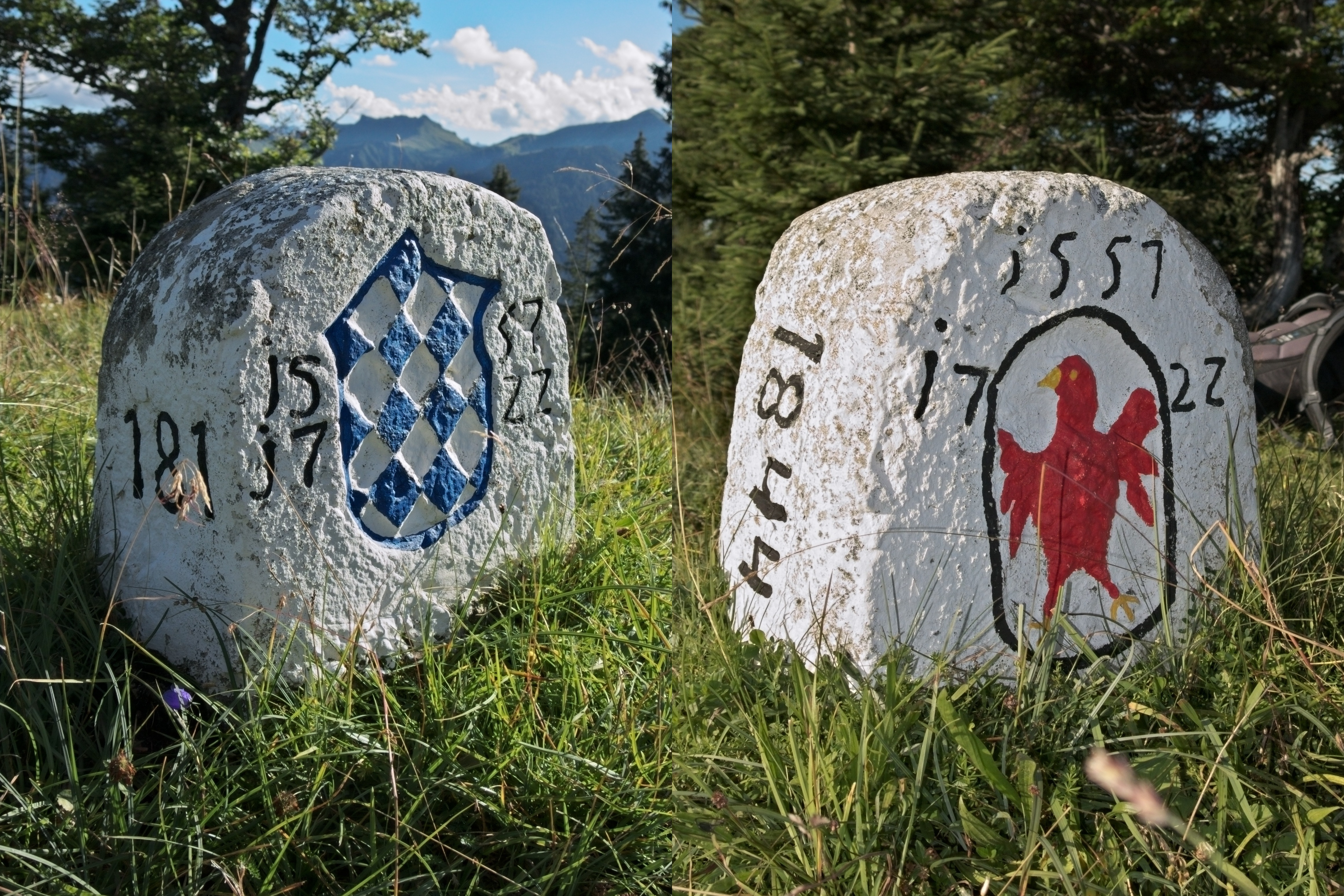 Grenzstein Bayern Tirol 1557/1722/1844 Nr.181 (Reitstein)